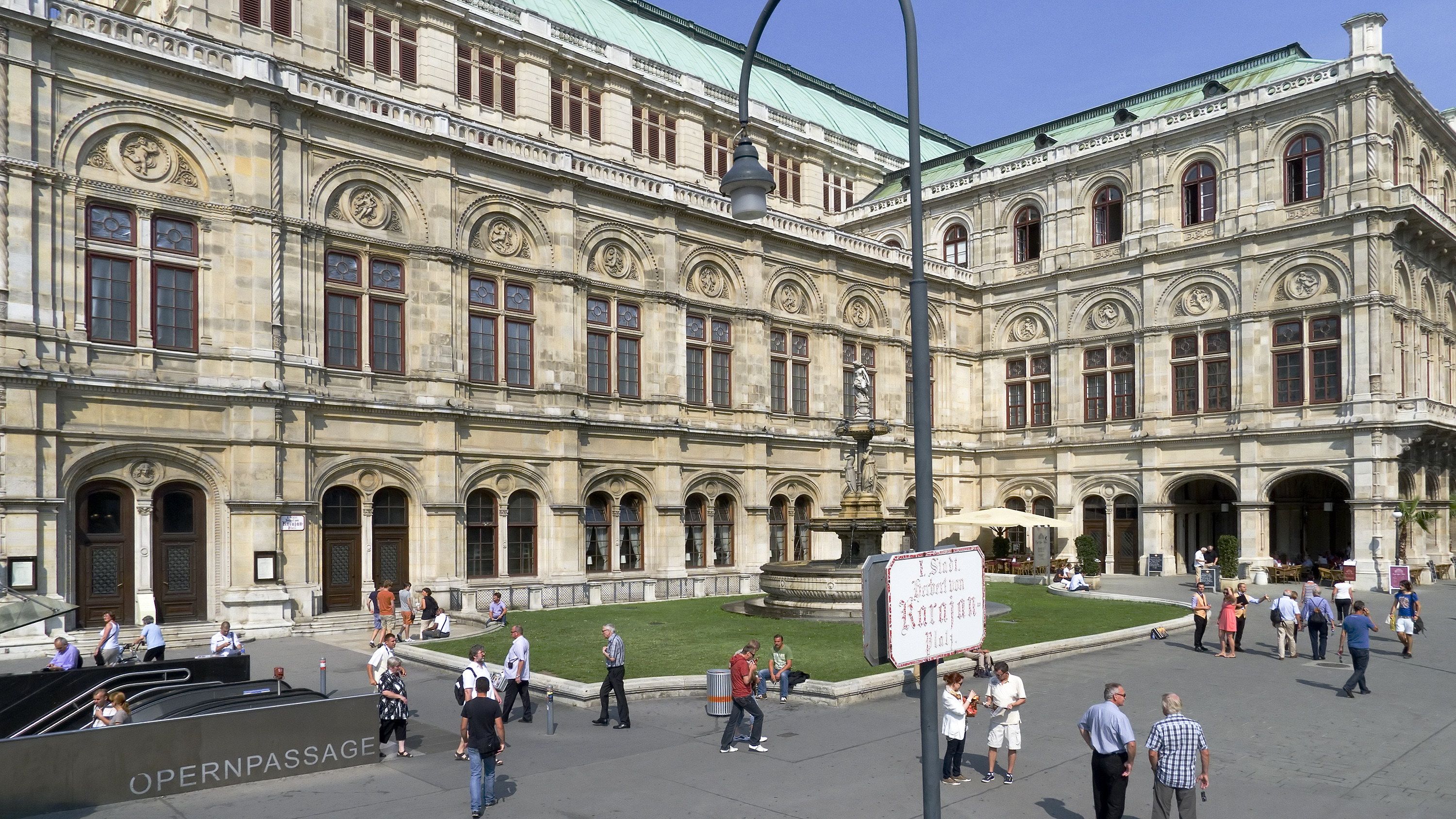 Herbert-von-Karajan-Platz in Wien 1 Richtung Nordwesten